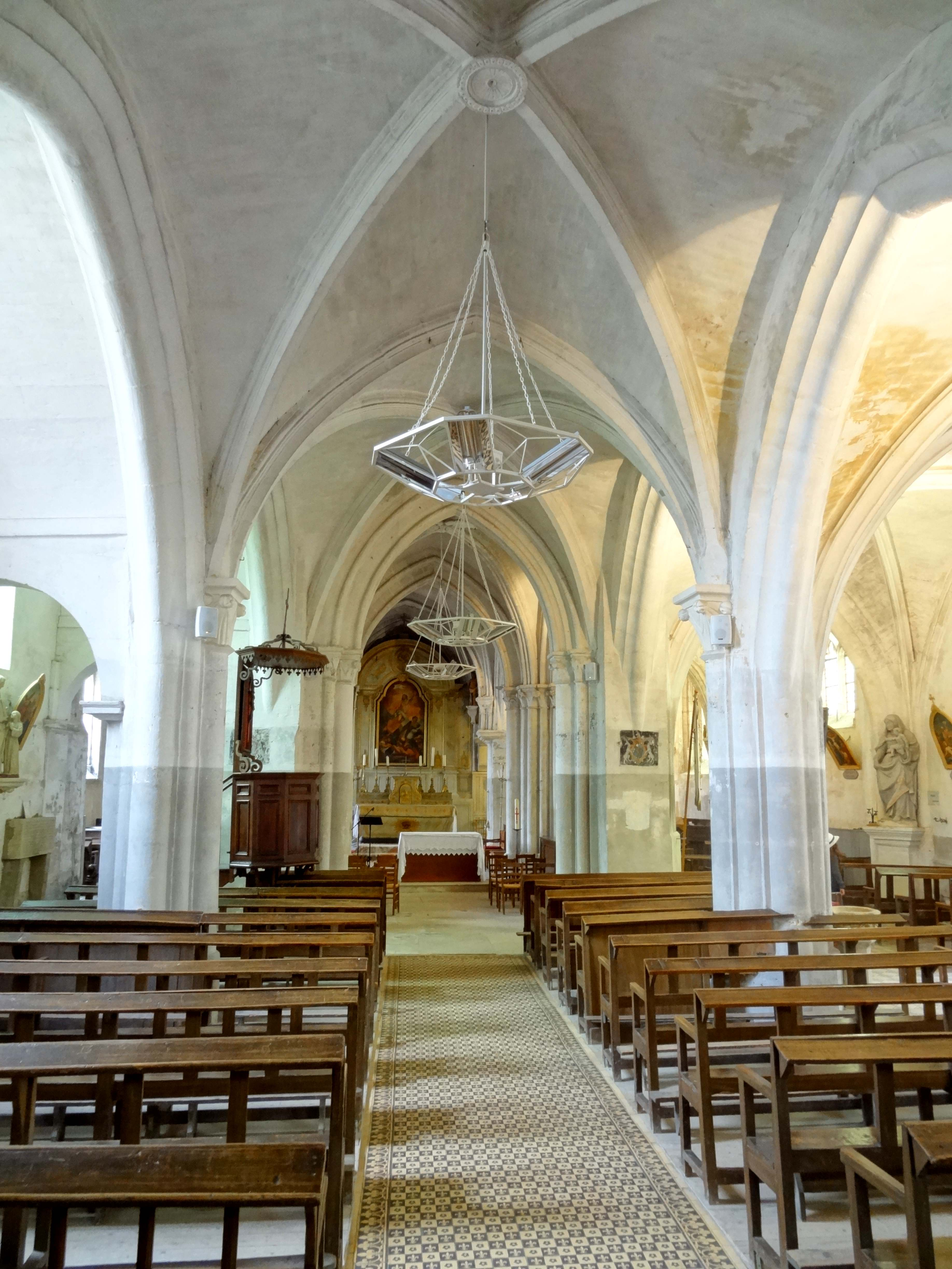 Intérieur de l'église - voir titre.